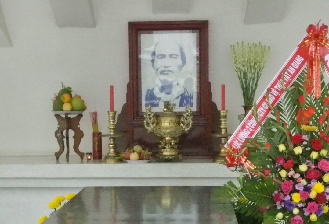 ベトナム、ドンタップ省カオラン市の墓に飾られたグエン・シン・サックの写真